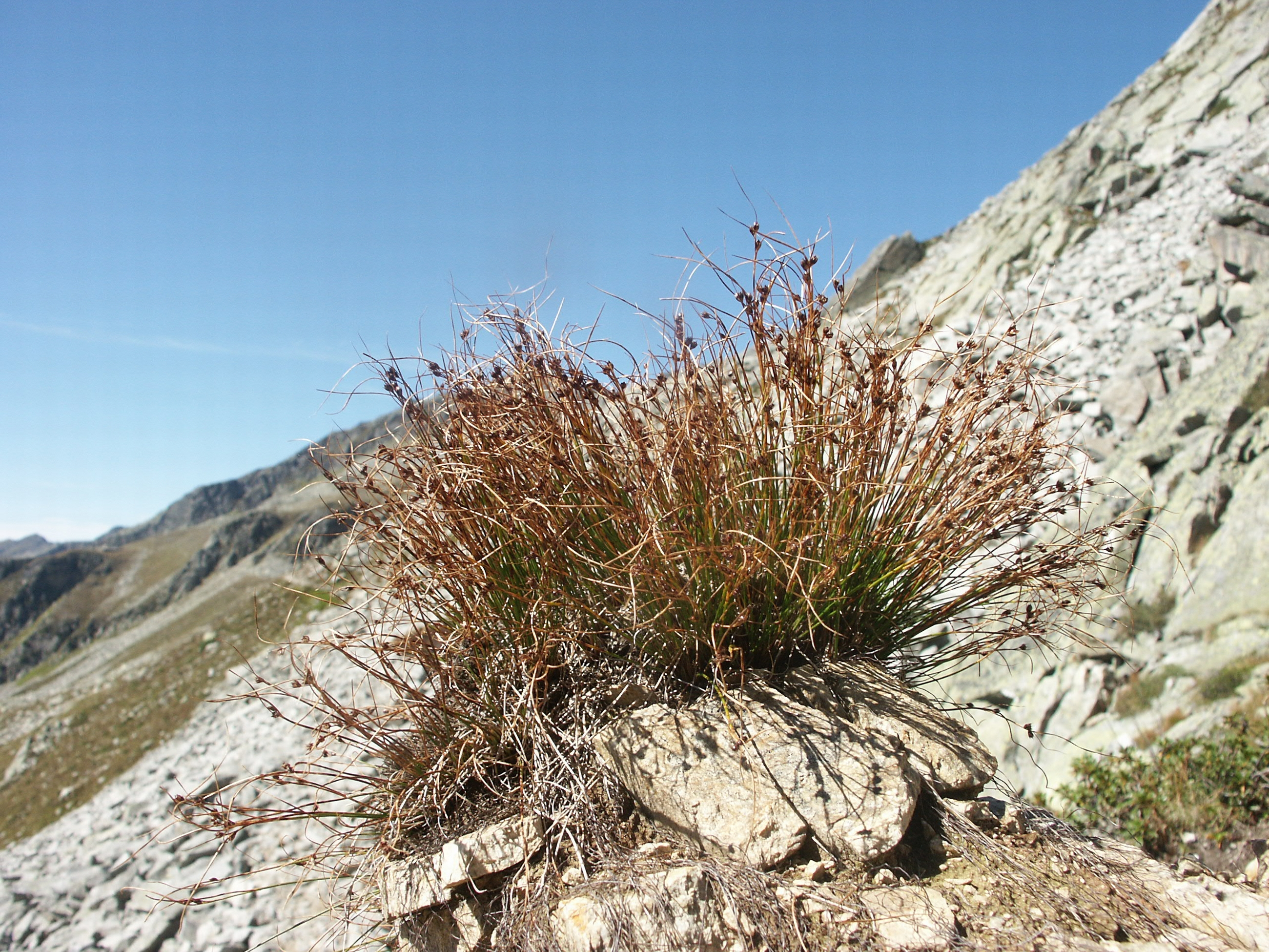 Juncus trifidus, Zillertaler Alpen, Italien